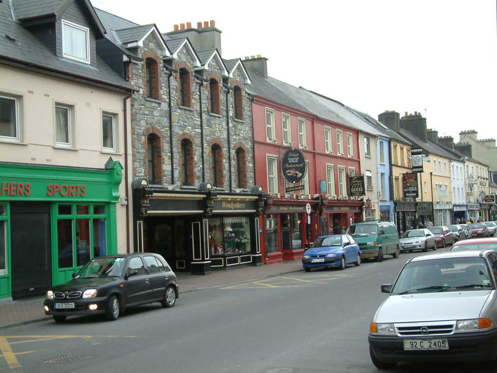 Stadtbild von Killarney